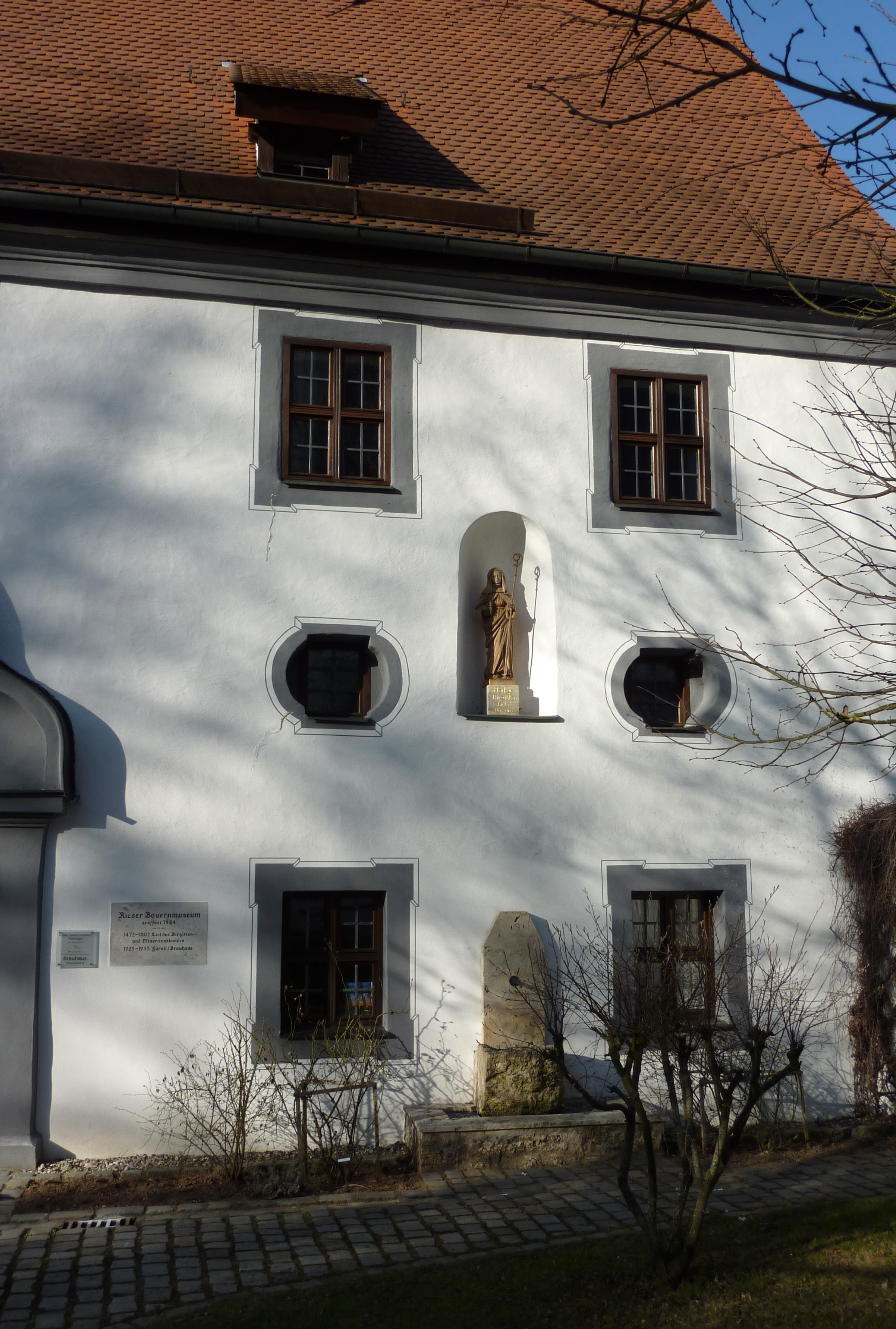 Ehemaliges Minoritenkloster Kloster Maihingen in Maihingen, einer Gemeinde im Landkreis Donau-Ries (Bayern)